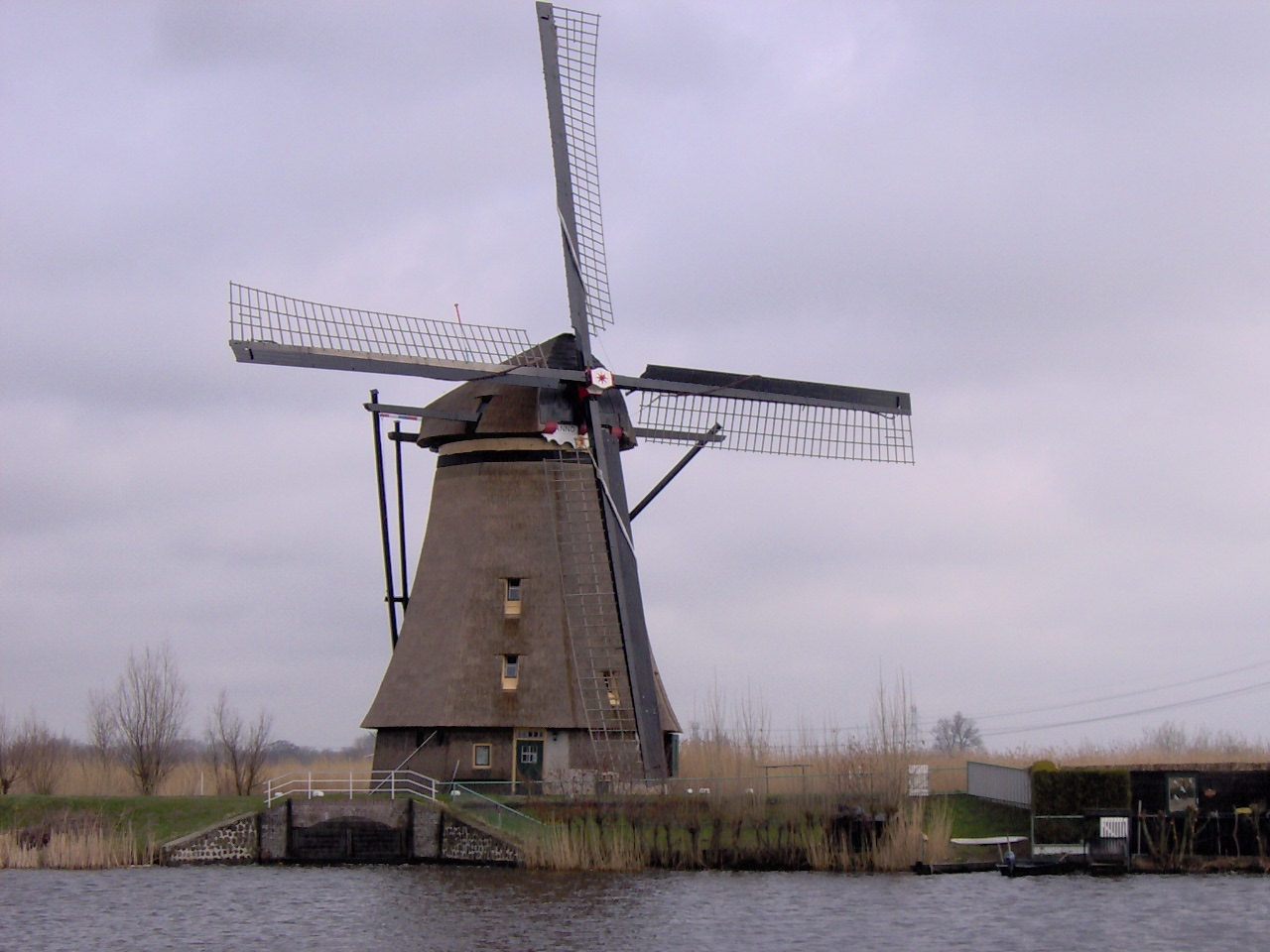 Kinderdijk in Neederlands